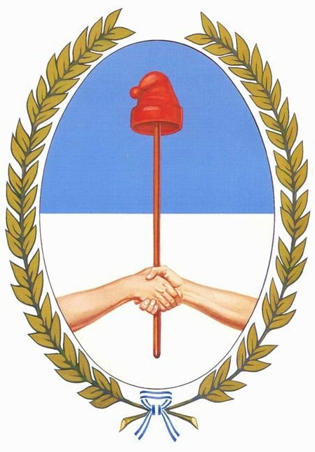 Escudo de armas de Tucuman